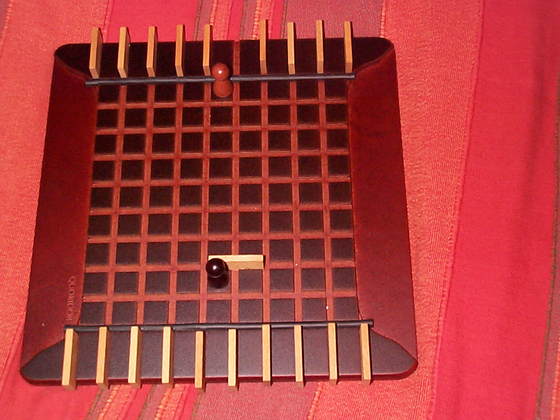 Lépés a Quoridor nevű játékban